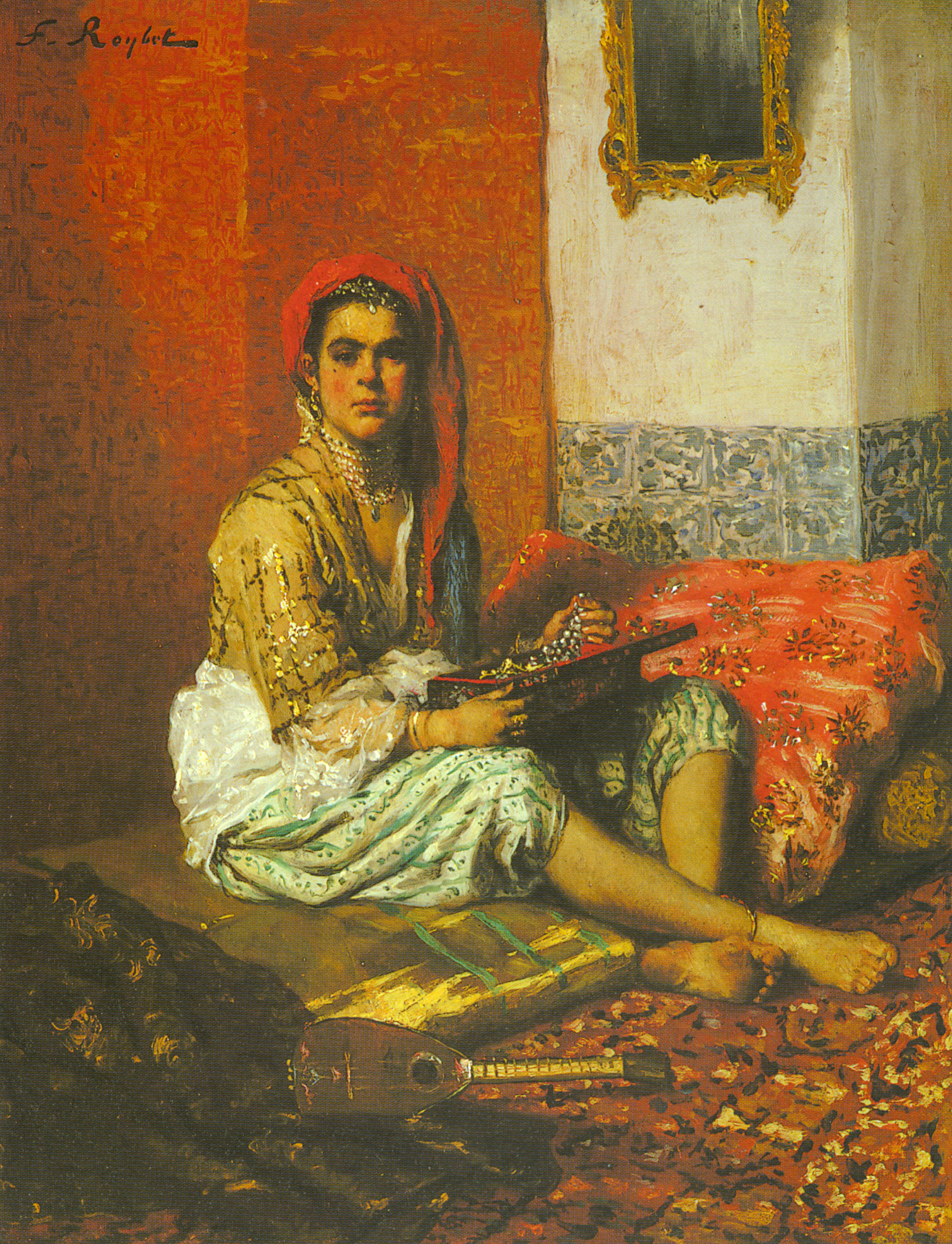 "L'Odalisque"